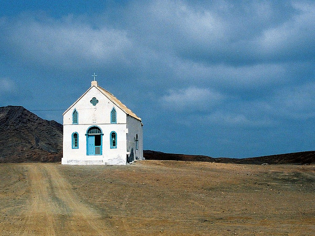 Capela e marca diurna em Pedra de Lume, ilha do Sal, Cabo Verde.